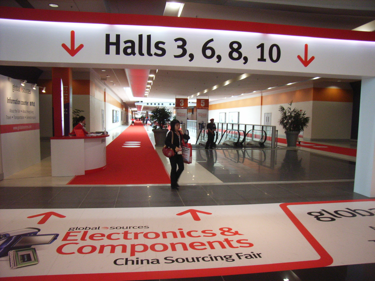 亞洲國際博覽館 AsiaWorld-Expo, Hong Kong 位於赤鱲角香港國際機場的北面，於2005年12月21日由行政長官曾蔭權主持開幕儀式。